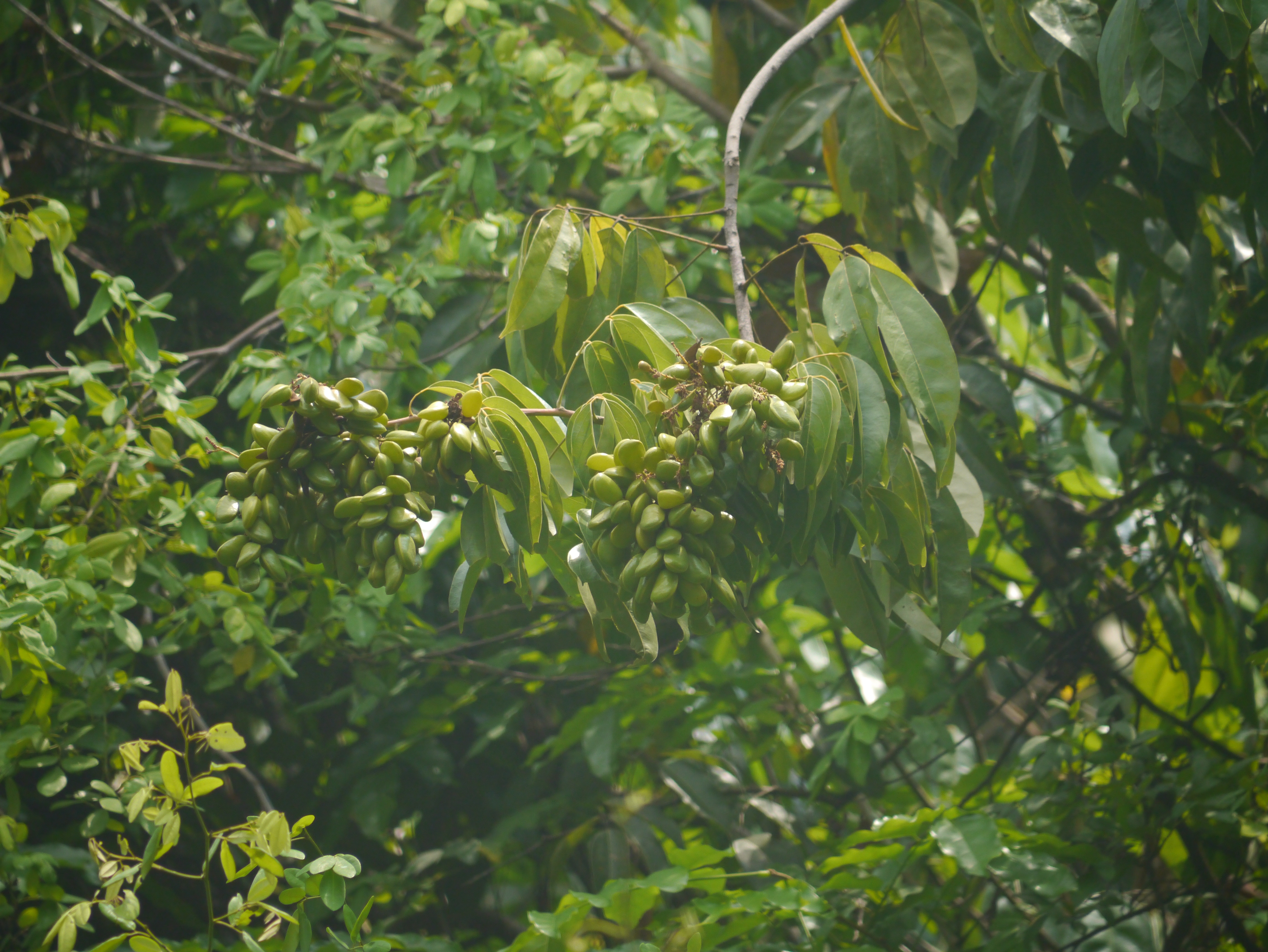 Connarus monocarpus